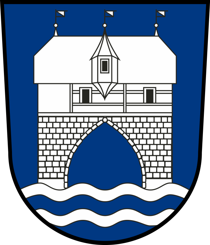 Wappen der Altstadt-Zürich Rechts der Limmat